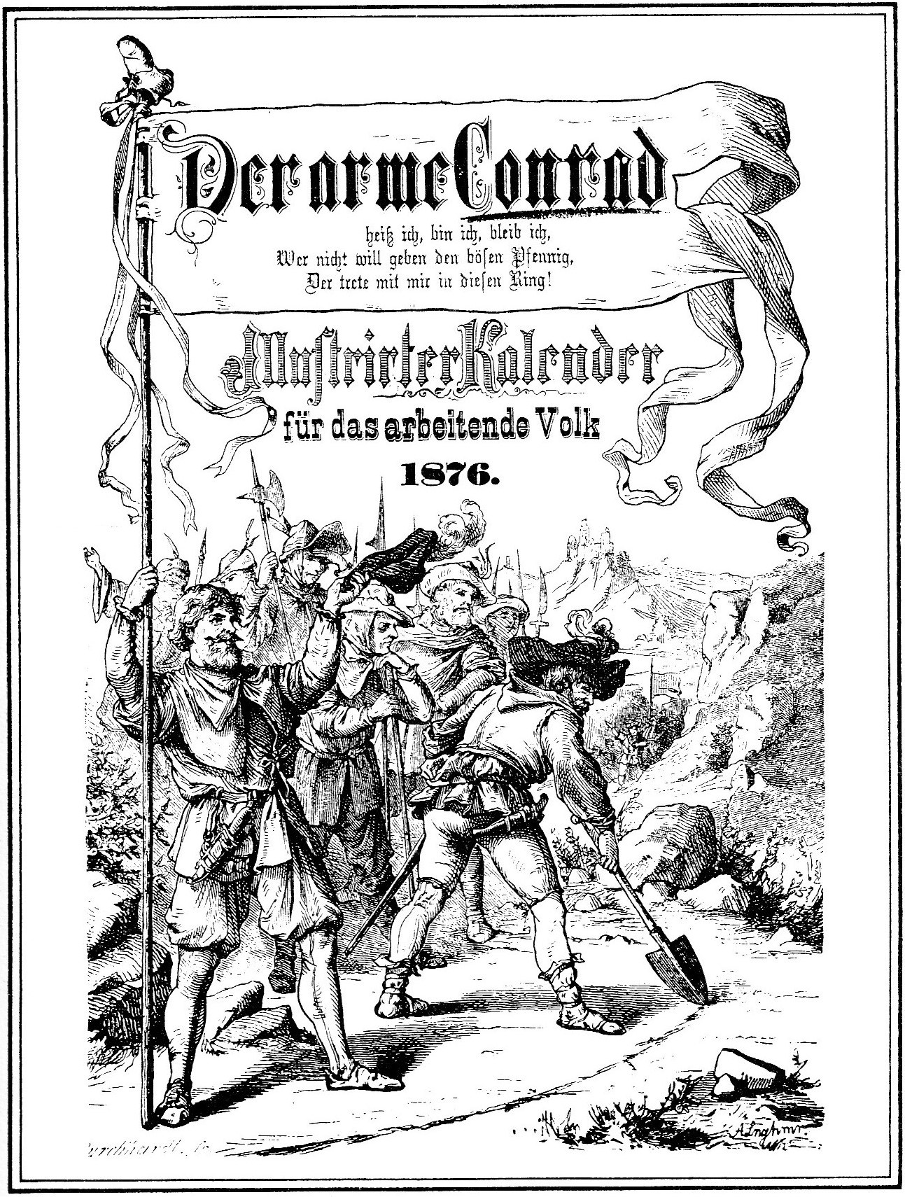 Arbeiterkalender mit Titel "Der Arme Conrad"